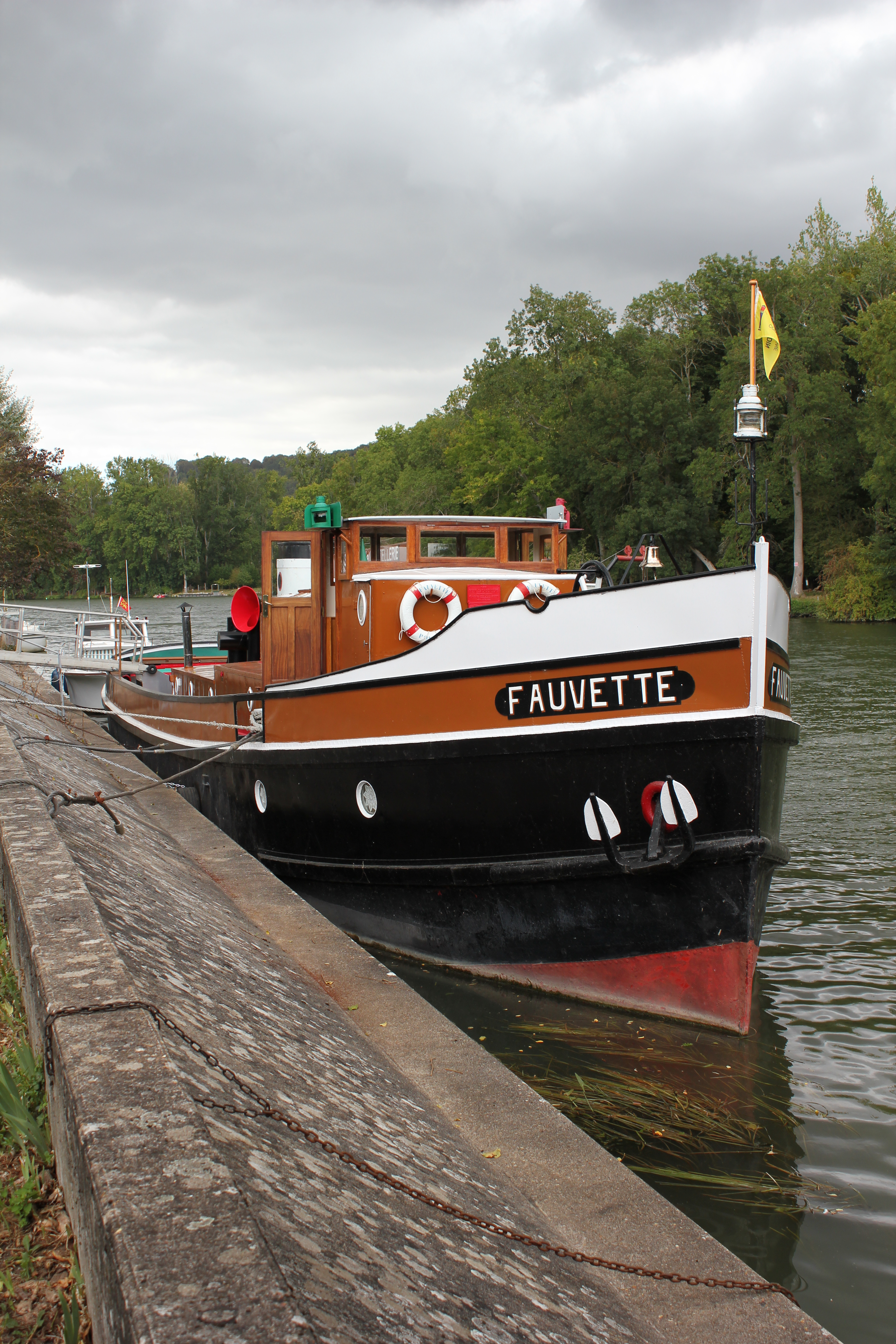 Bateau-remorqueur Fauvette (MH) basé à Poses